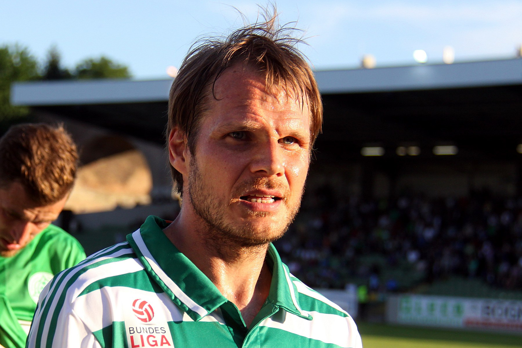 Meisterschaftsspiel der österreichischen Bundesliga: SV Mattersburg gegen SK Rapid Wien am 18. Mail 2013 (2:0)] im Mattersburger Pappelstadion.] - Das Foto zeigt Markus Heikkinen (SK Rapid Wien).